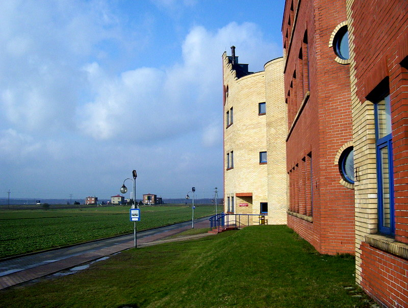 Zdjęcie budynku szkoły w Paniówkach